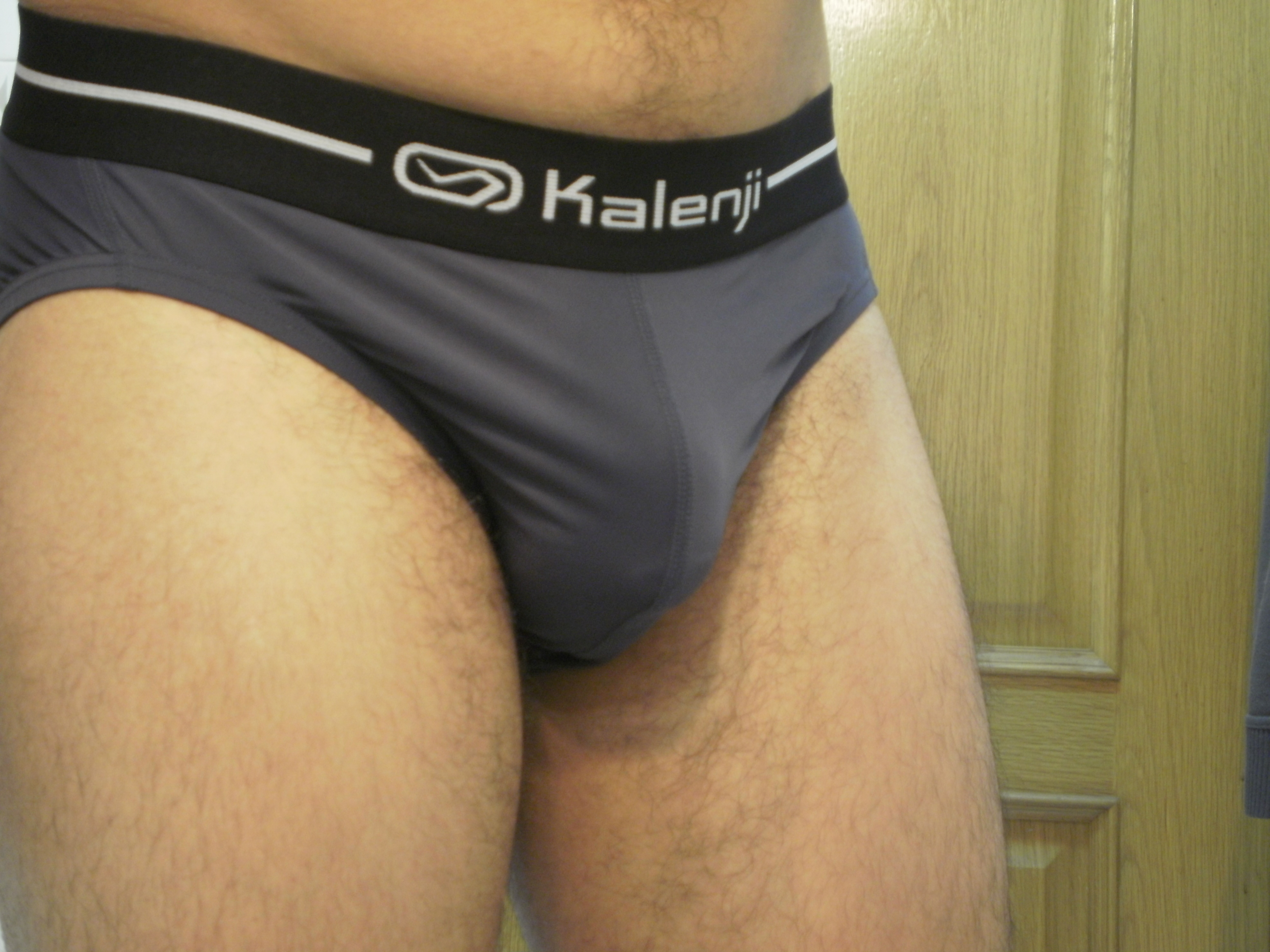 Hombre usando un calzoncillo tipo slip